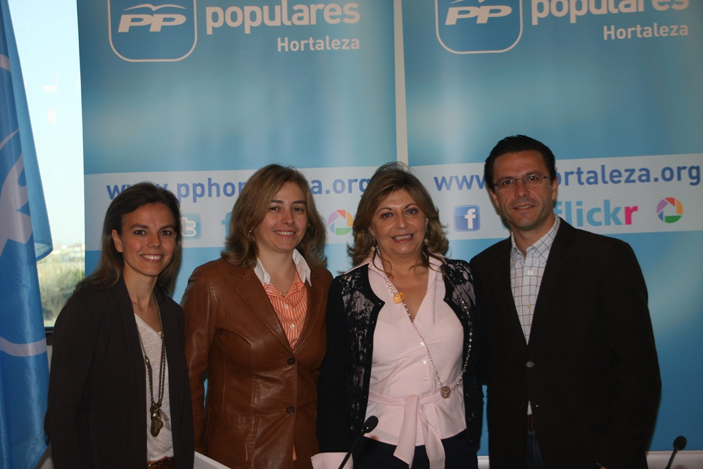 III Escuela de Formación del PP de Hortaleza